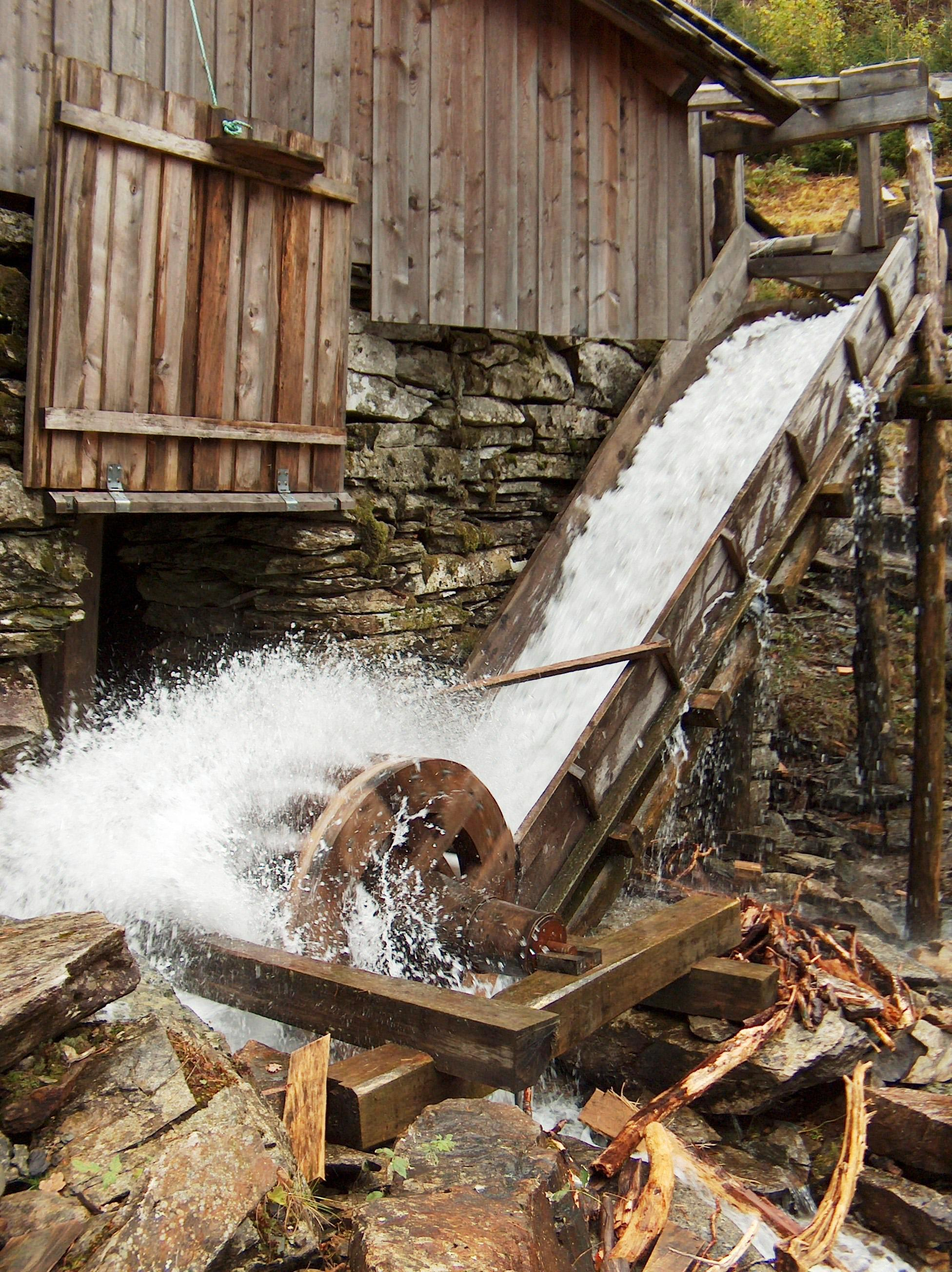 Vannhjul til oppgangssagbruk from Kvam in Norway